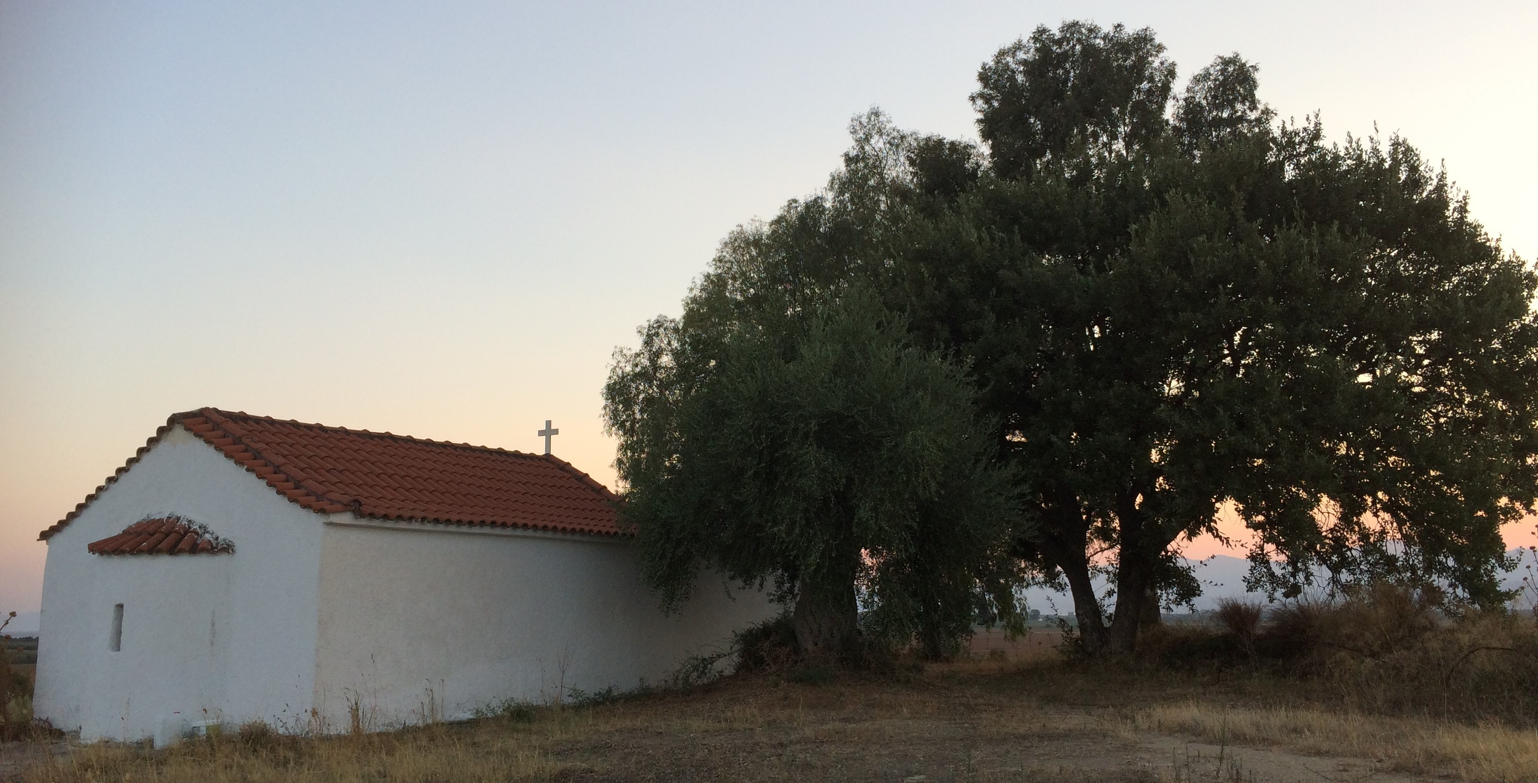 Αγιος Ευστράτιος (όψη 2), Αστέρι Λακωνίας